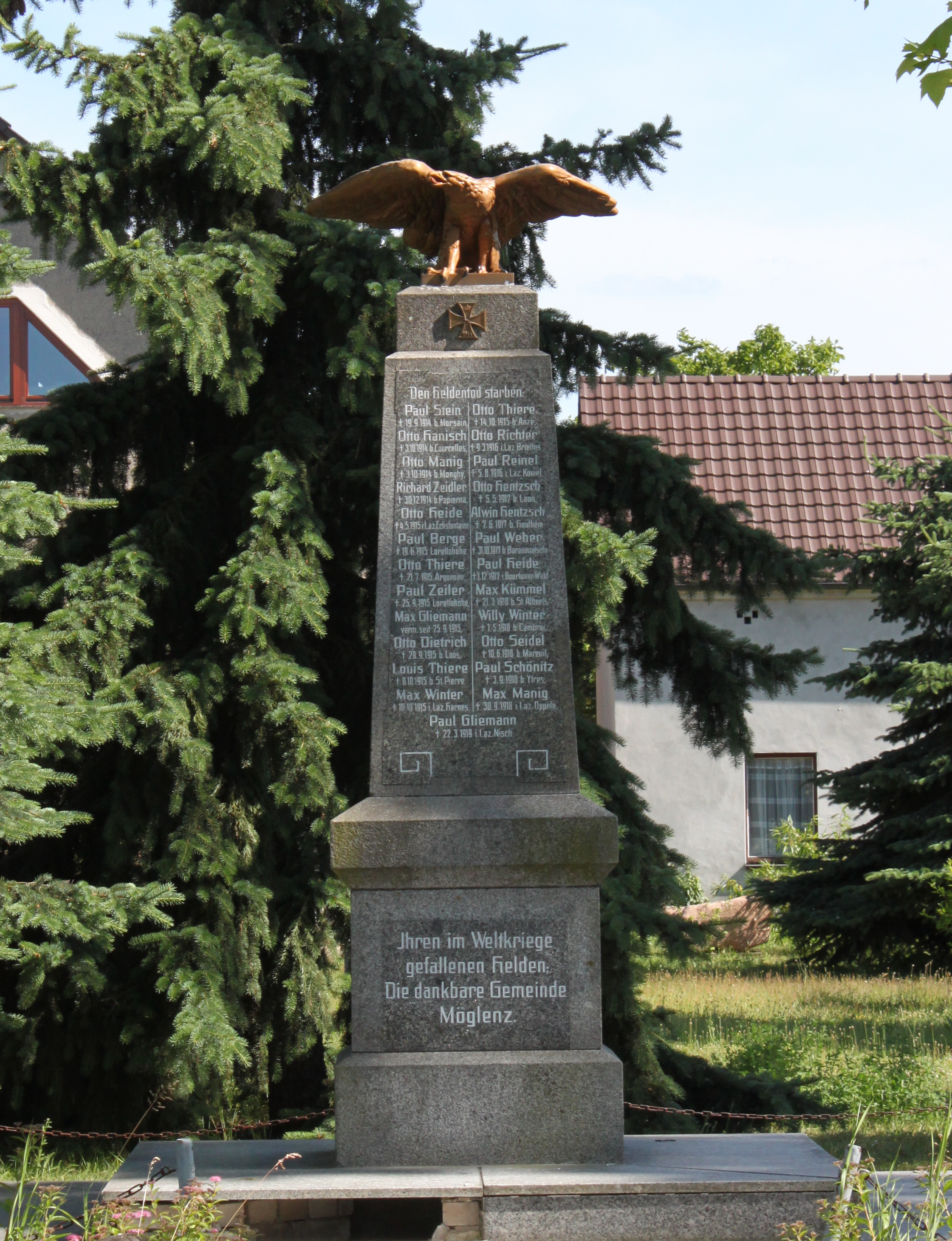 Kriegerdenkmal Möglenz